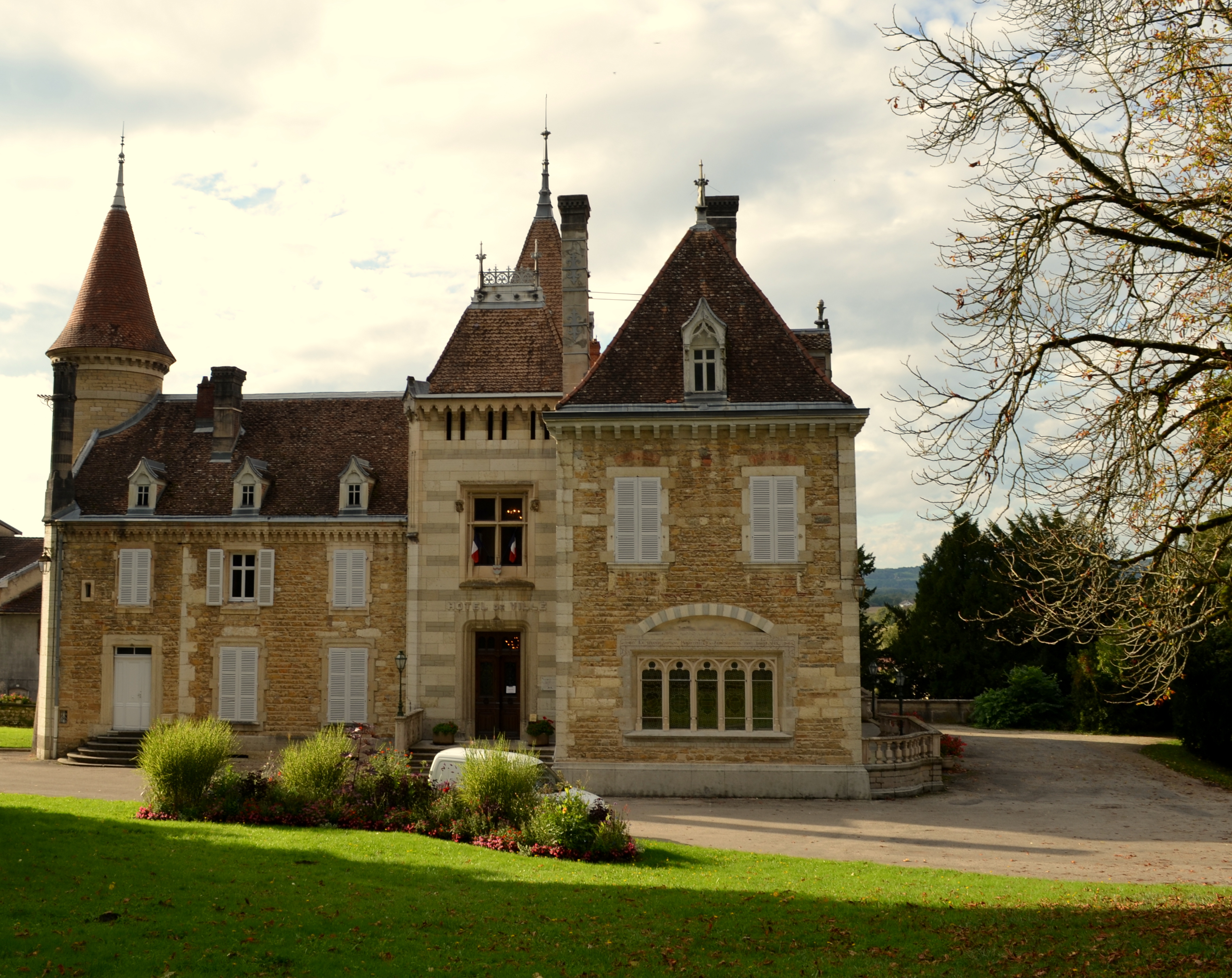 Mairie d'Ambronay.